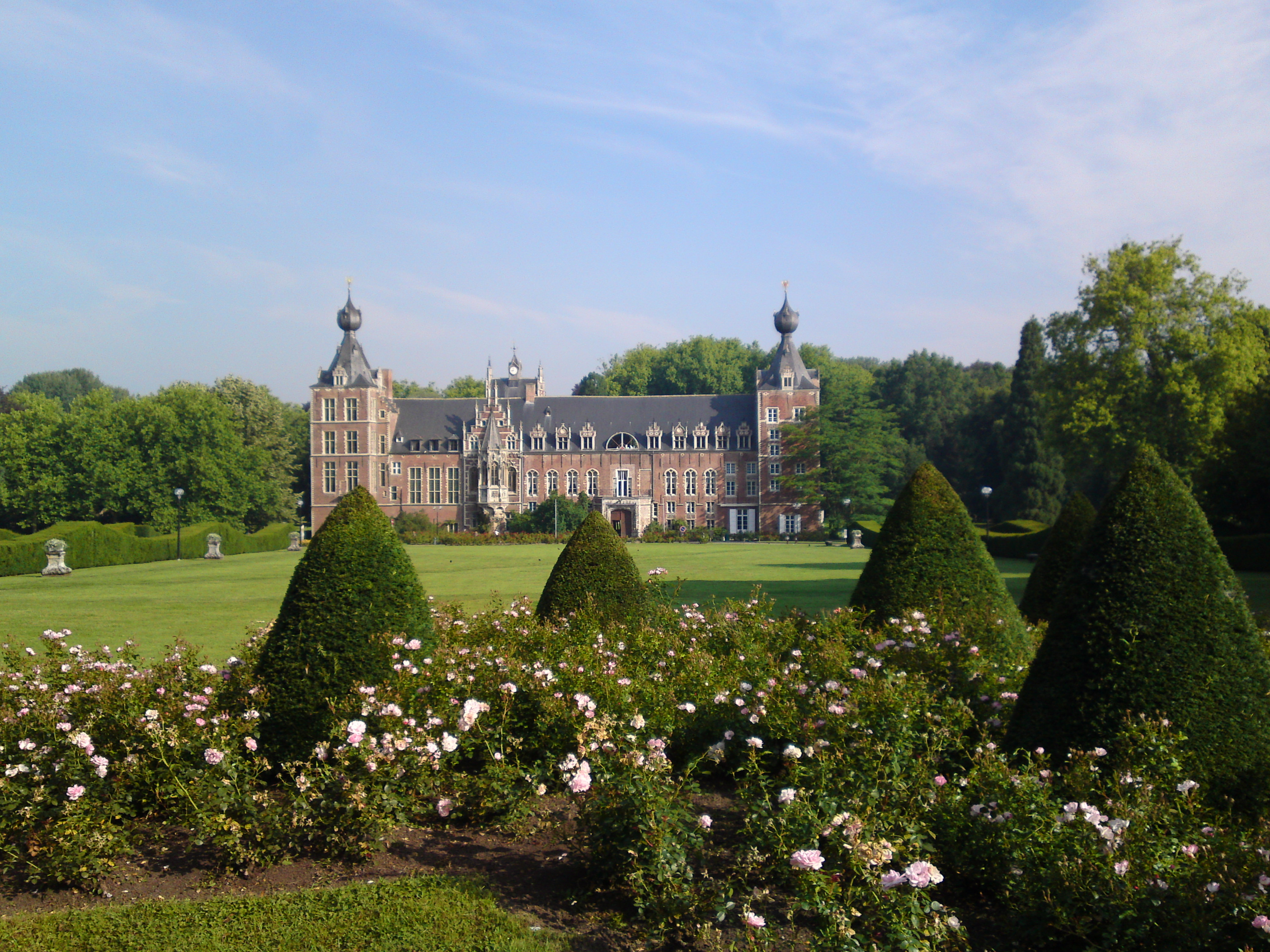 Leuven University